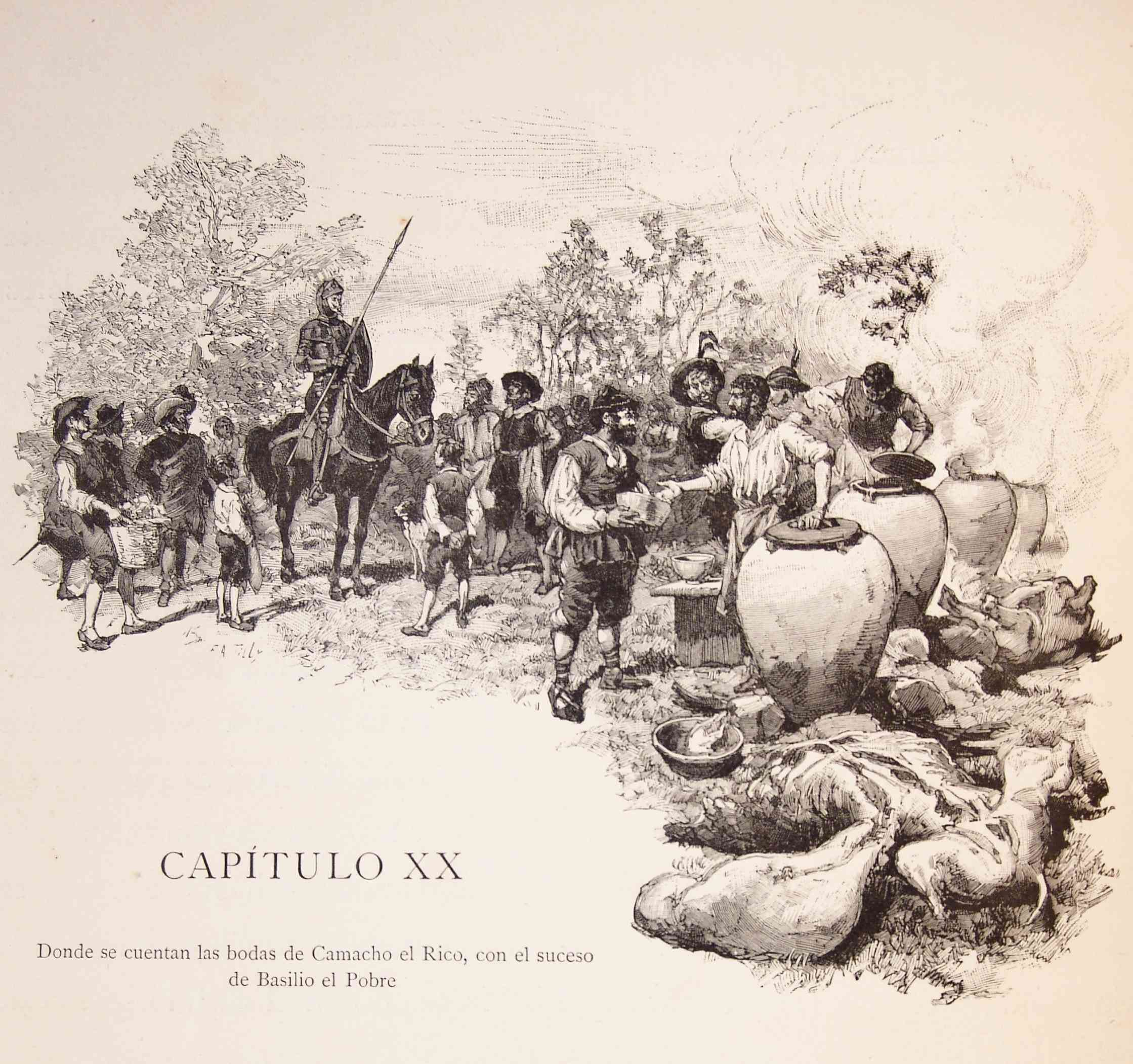 "Don Quixote" — Edición anotada por Nicolás Díaz de Benjumea e ilustrada por Ricardo Balaca (1880-1883). 202_176_quijote_cap20